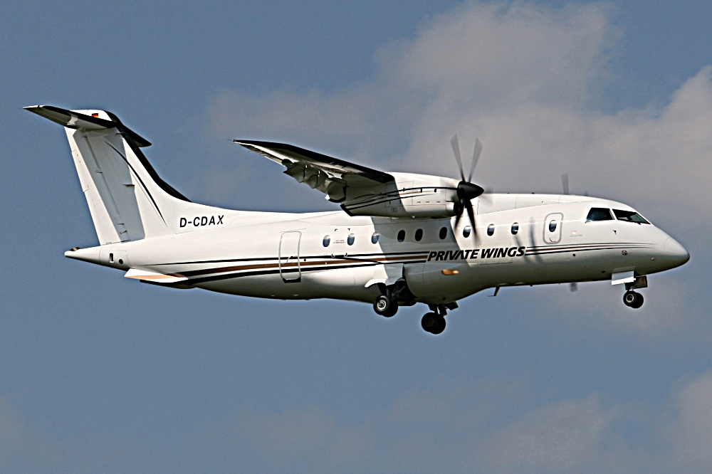 Private Wings Dornier 328 D-CDAX